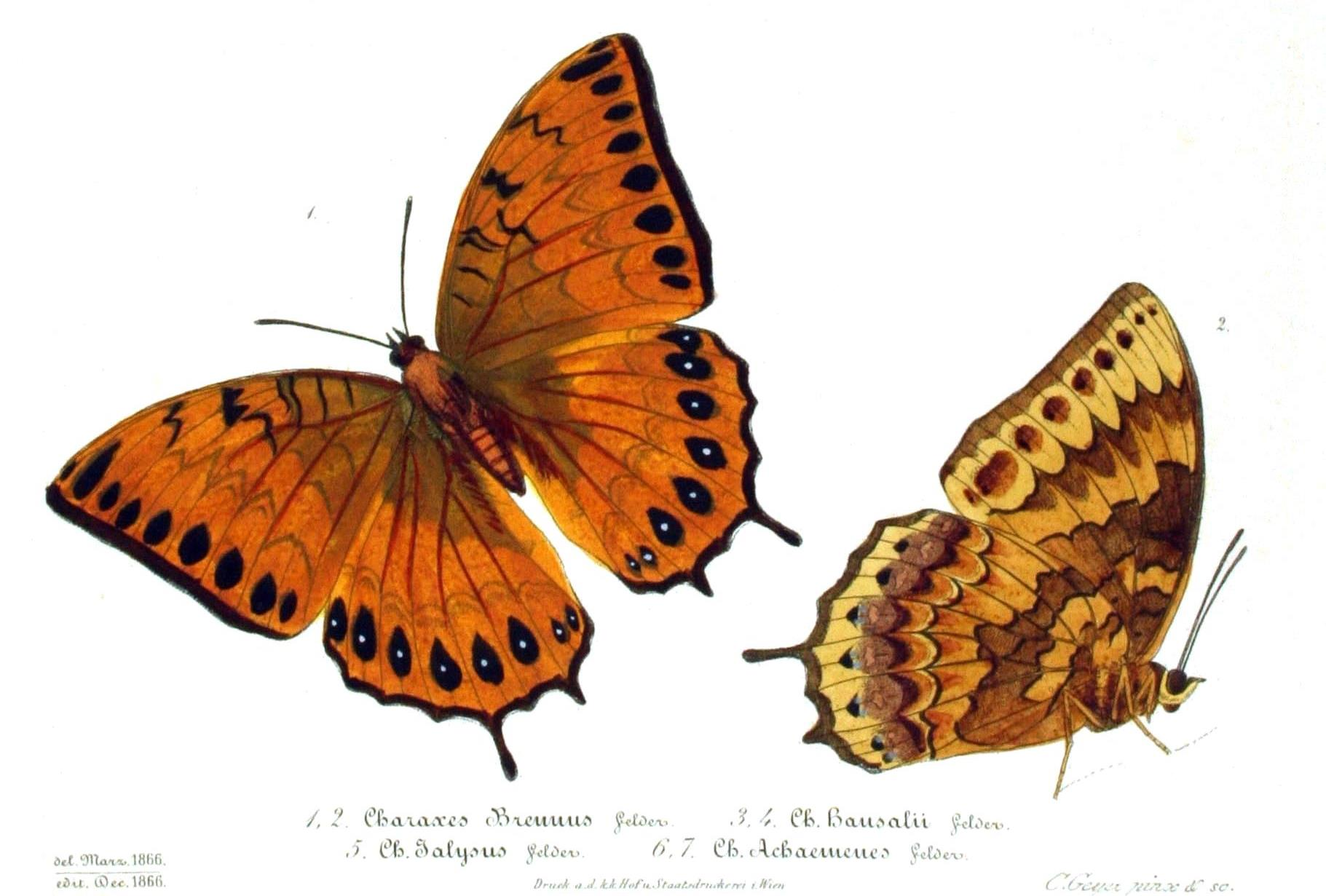 Charaxes latona (1,2) Charaxes brennus syn. Charaxes latona brennus C. & R. Felder, [1867]